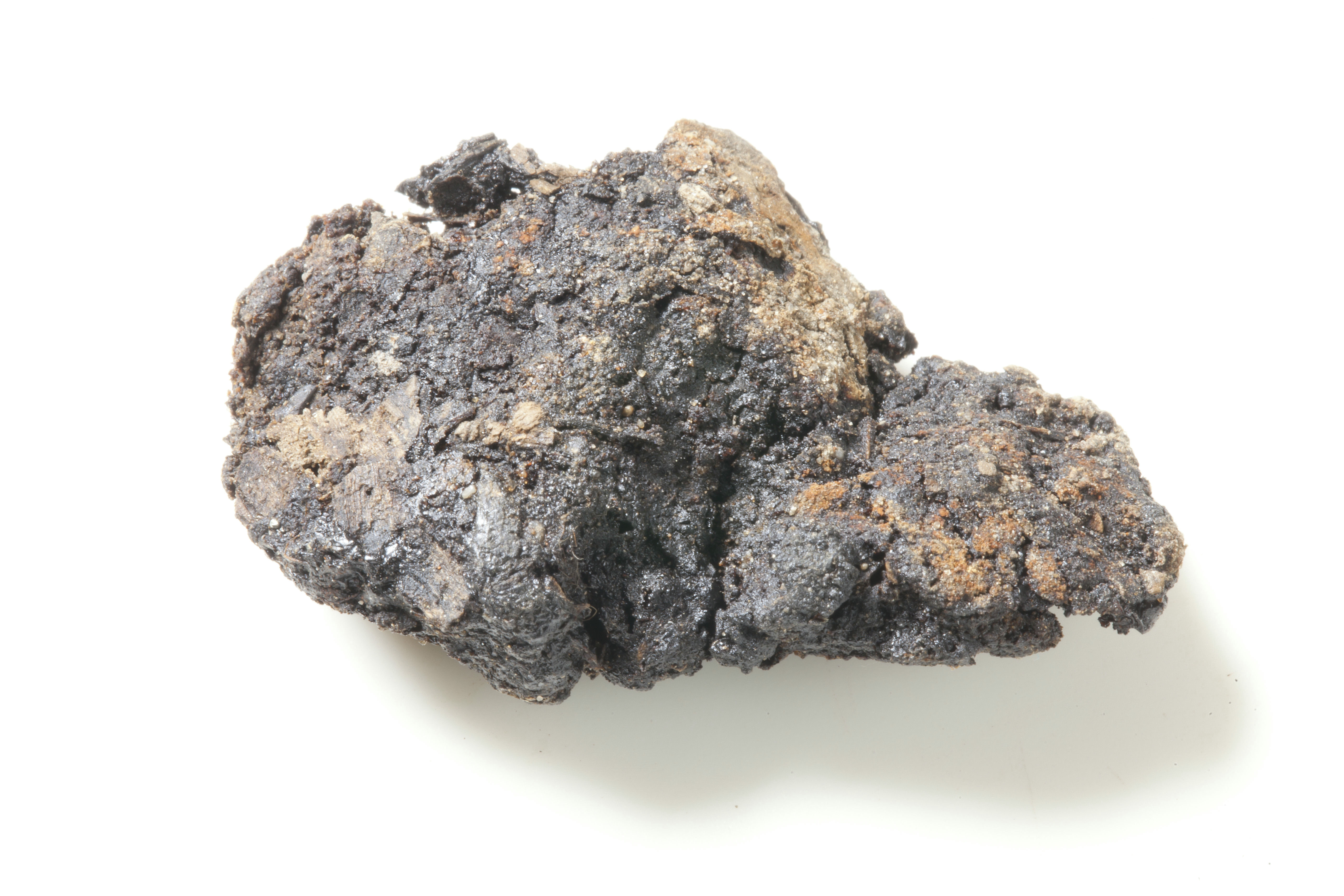 monster kwik Objectnummer: [MA]ZP33-129 Materiaal: Kwik